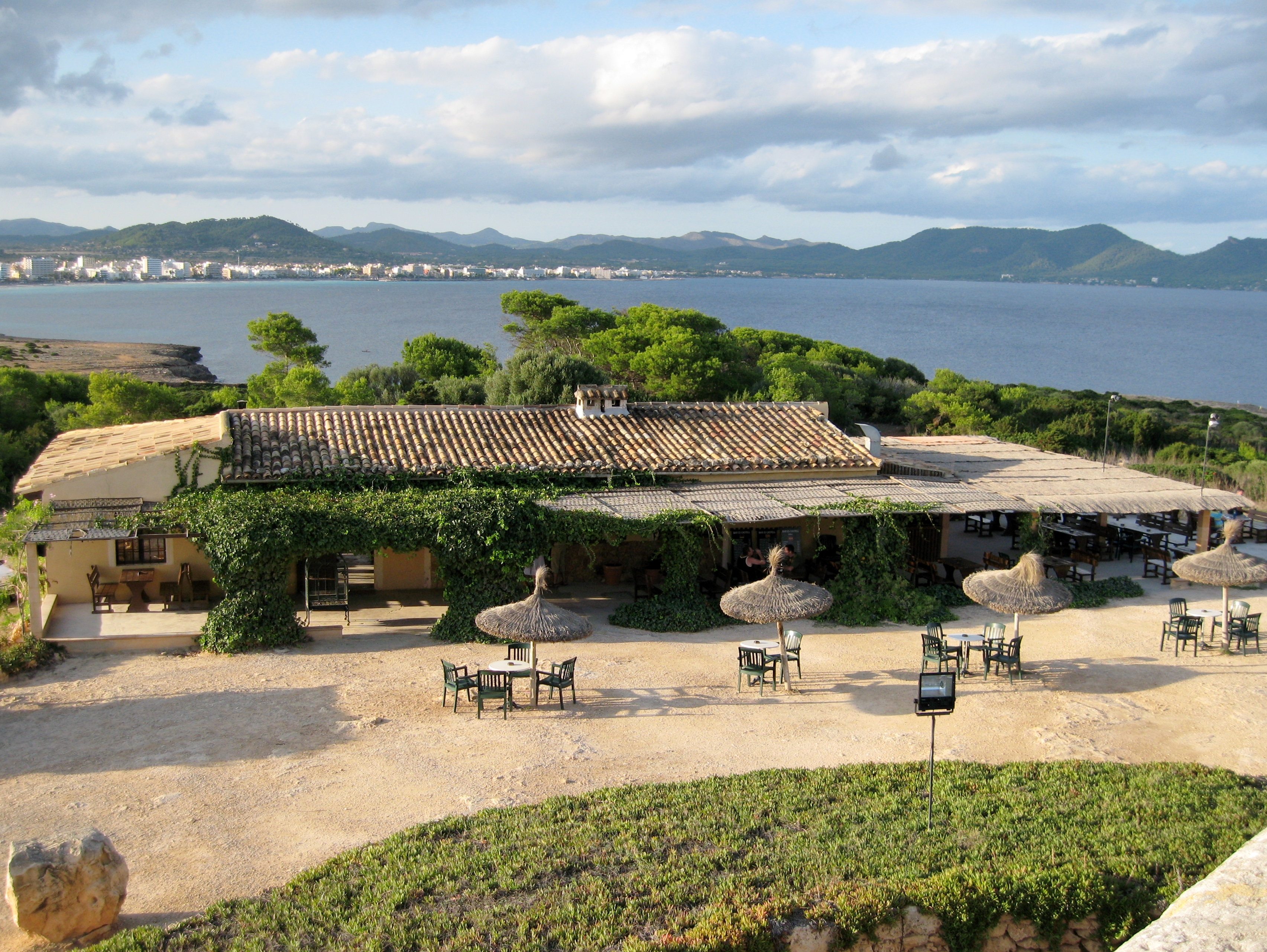 Punta de n'Amer, Sant Llorenç des Cardassar, Mallorca, Spain